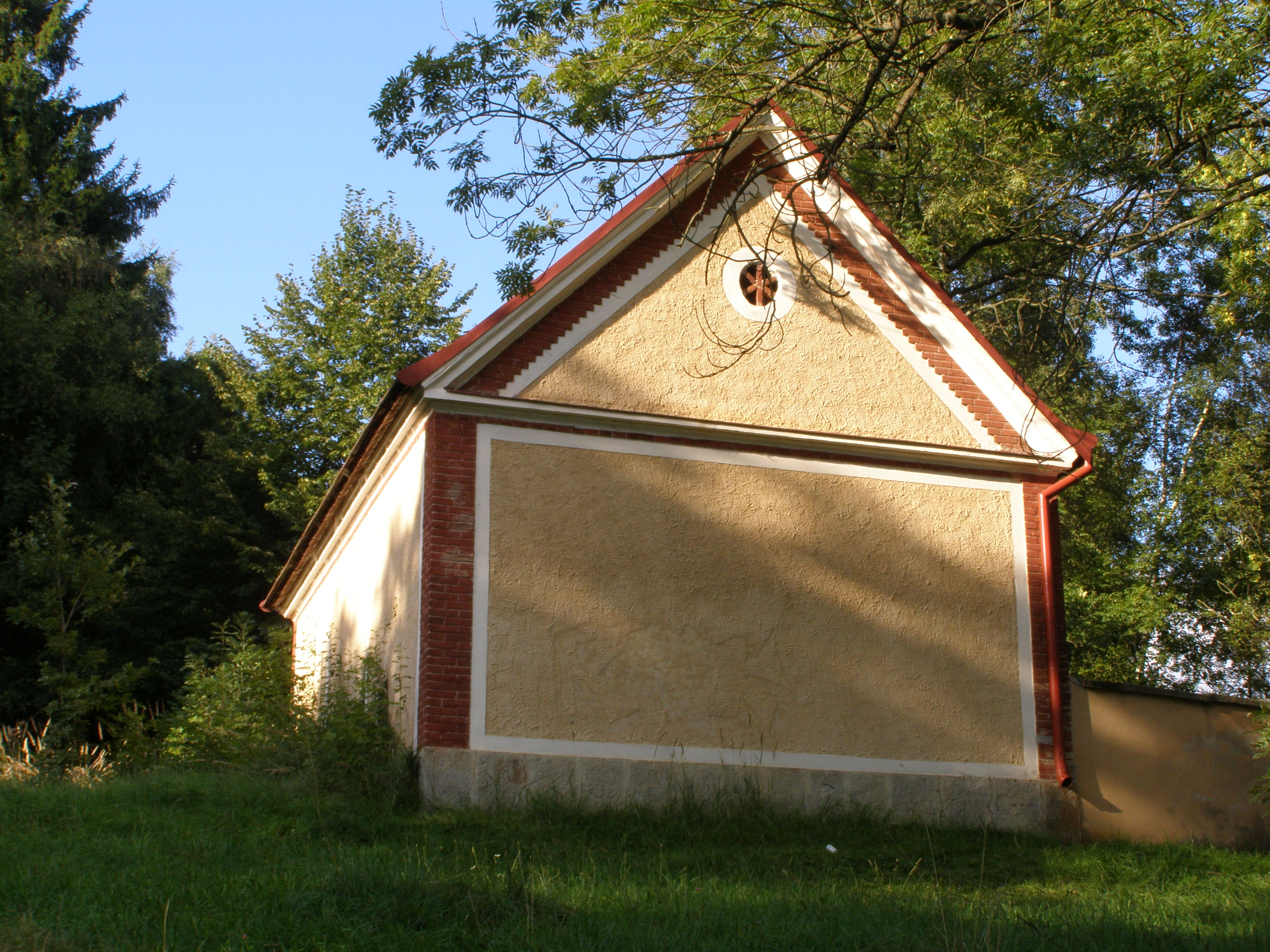 Telč, Staré Město, židovský hřbitov, obřadní síň